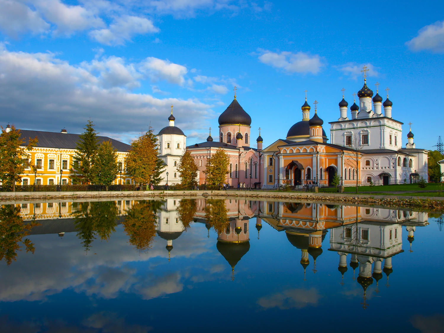 Монастырь «Вознесенская Давидова Пустынь »: Молодежная улица (Давыдова Пустынь), Новый Быт, Чеховский район, Московская область